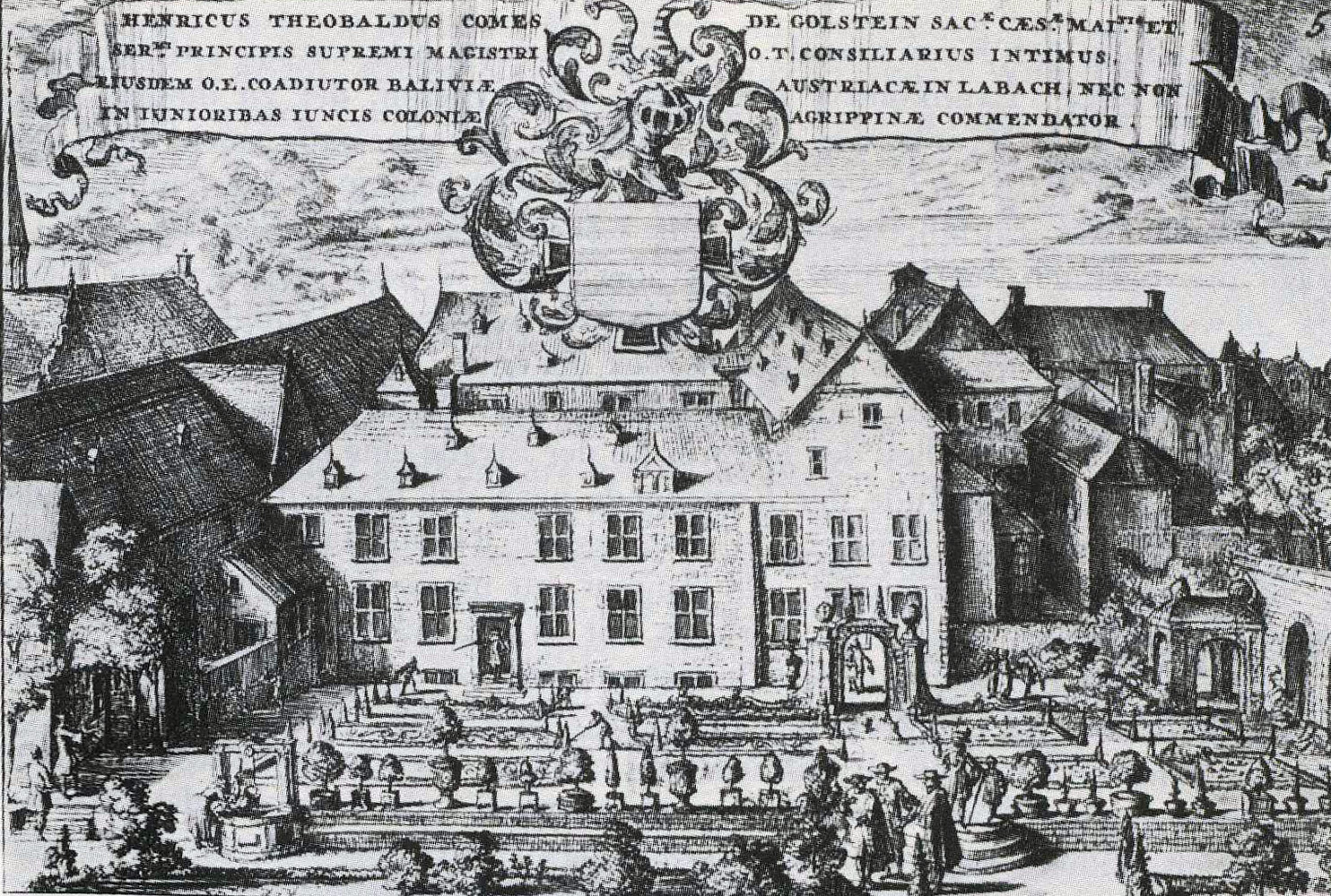 Deutschordenskommende Jungen-Biesen, Köln. Kupferstich um 1700 mit einer Ansicht von der westlichen Gartenseite